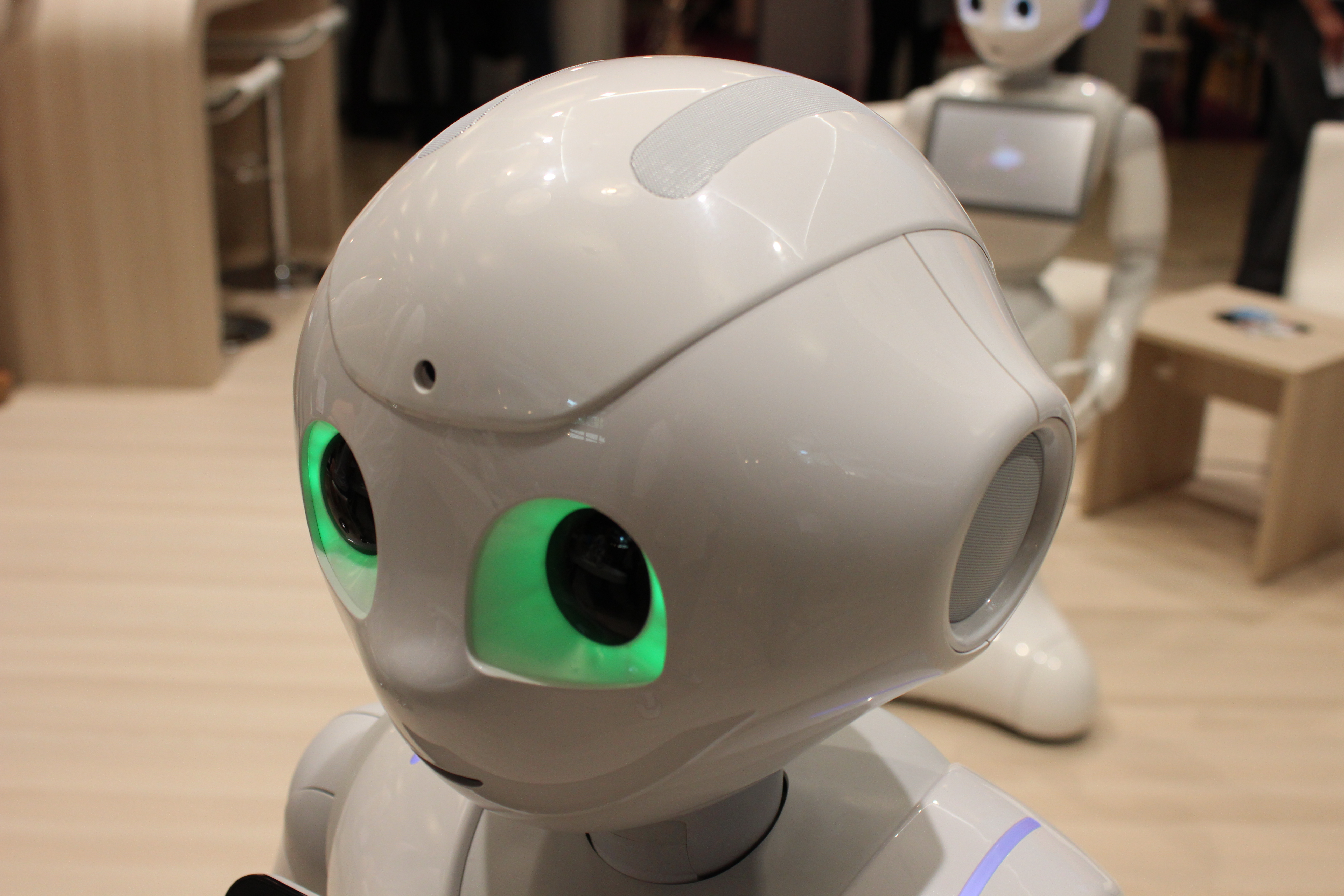 Le robot Pepper de l'entreprise Aldebaran au salon Innorobo à Lyon en 2015.